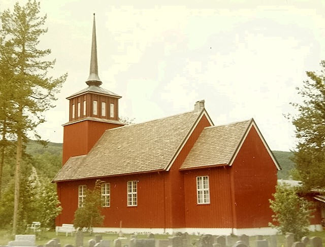 Øvre Saltdal kirke